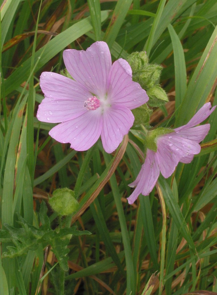 zelfgemaakte foto van Muskuskaasjeskruid (Malva moschata) bloem; half september.